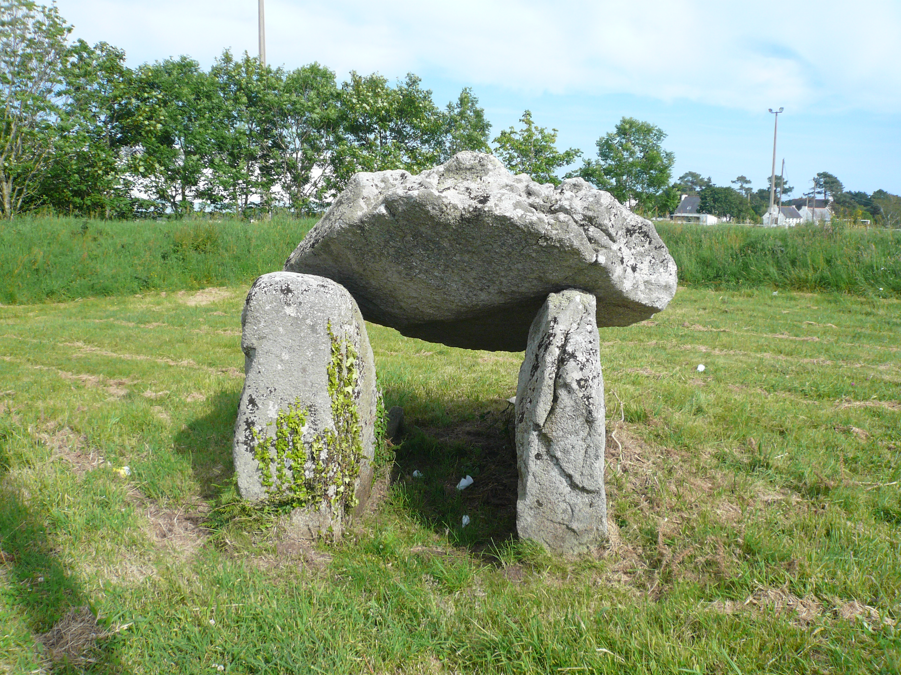 Vue de face du dolmen de Kervignon, commune de Plobannalec-Lesconil, Finistère, Bretagne, France.